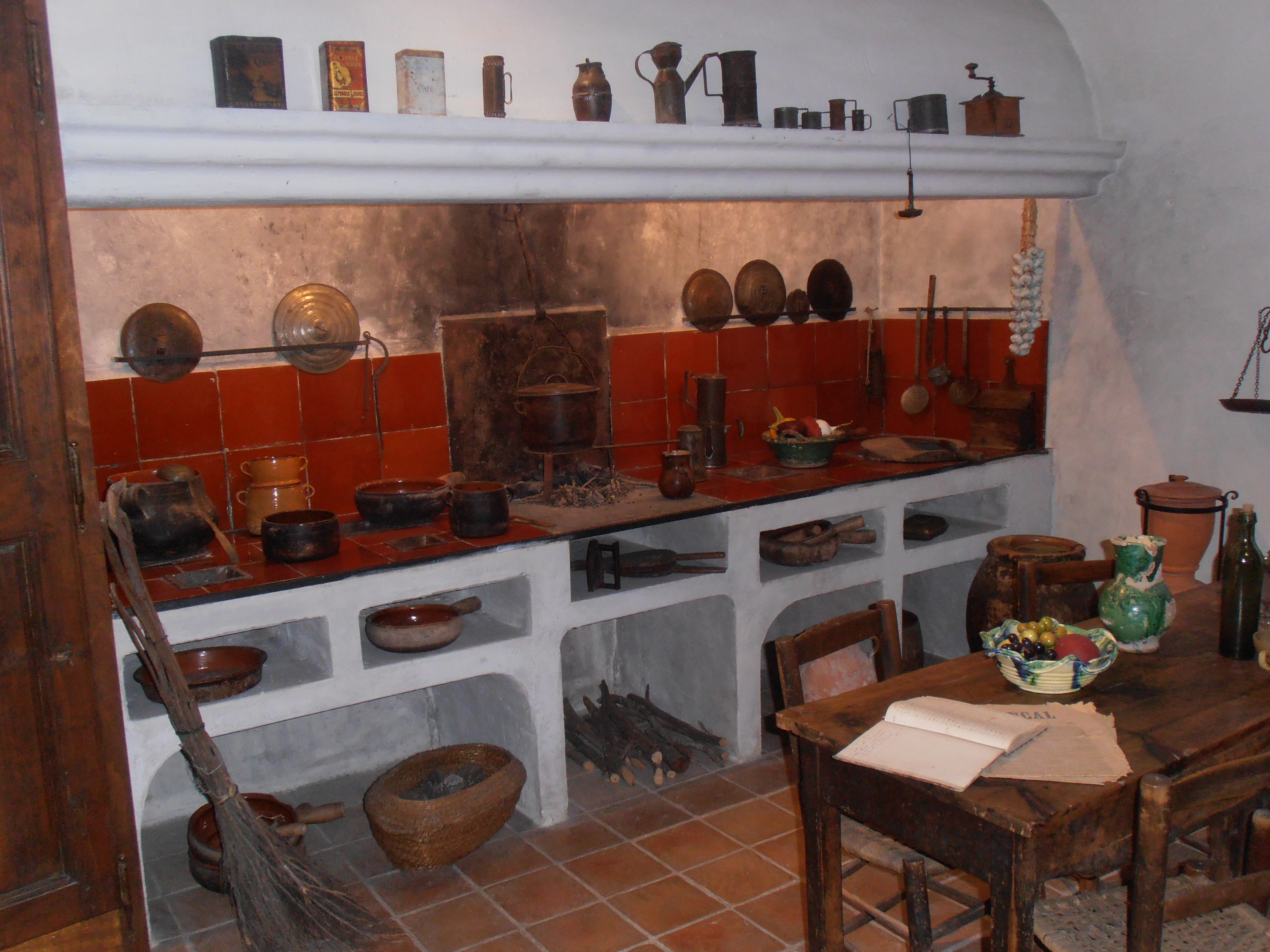 ar, Draguignan, Musée des arts et traditions de Moyenne Provence. Cuisine provençale.